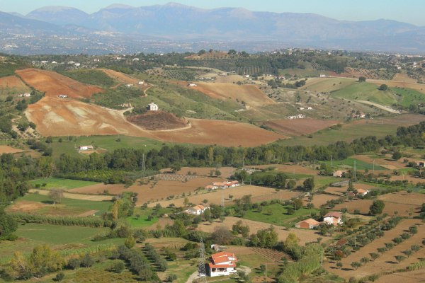 Campagna di San Marco Argentano